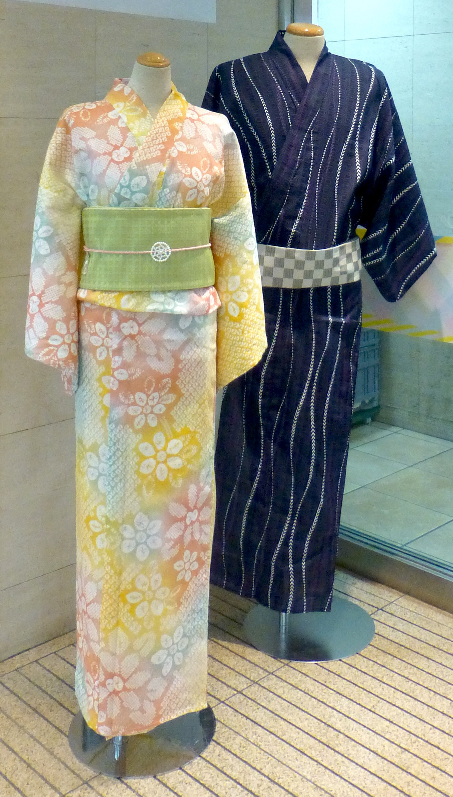 女性の浴衣と男性の浴衣 (Female yukata and male yukata)